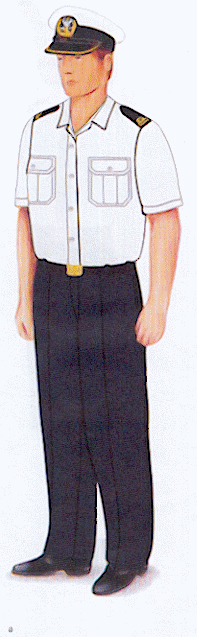 Rysunek ten pochodzi z załącznika do rozporządzenia ministra obrony narodowej z dnia 2 grudnia 2004 r. w sprawie wzorów oraz noszenia umundurowania i oznak wojskowych przez żołnierzy zawodowych i kandydatów na żołnierzy zawodowych.